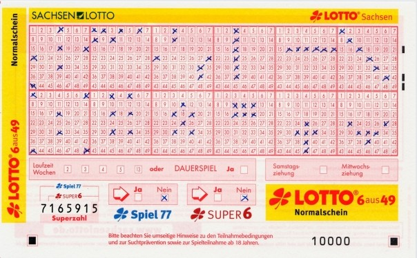 Deutscher Lottoschein Sachsen